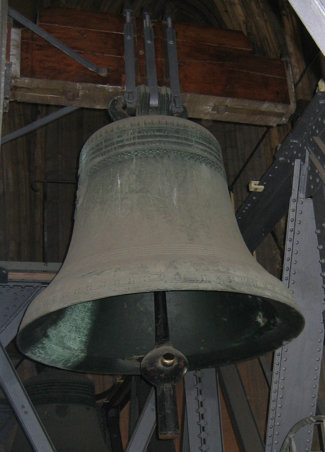 Ursulaglocke. Fünftgrößte Glocke des Kölner Domes.